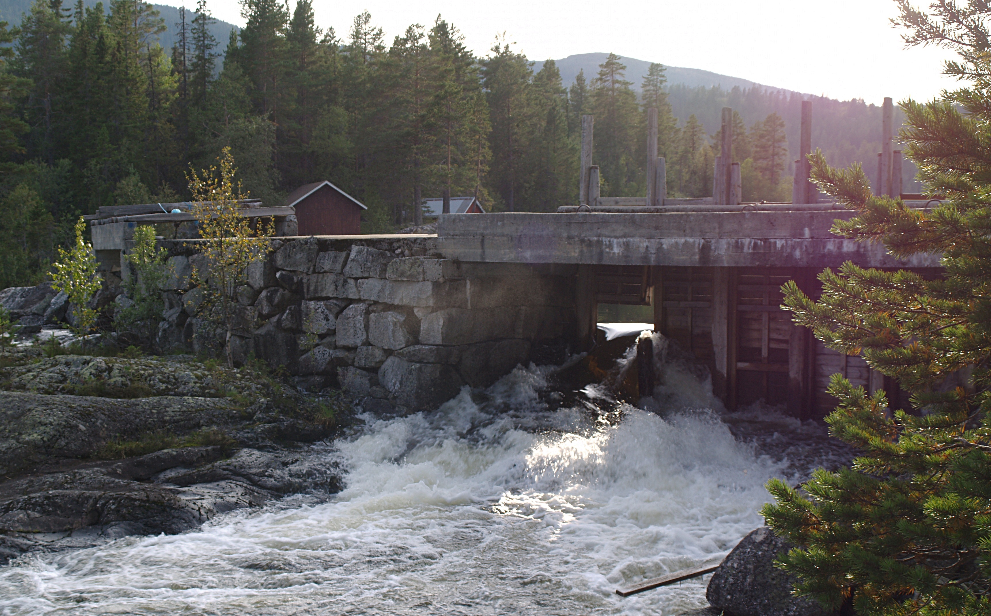 From Nevlingen in Vassfaret